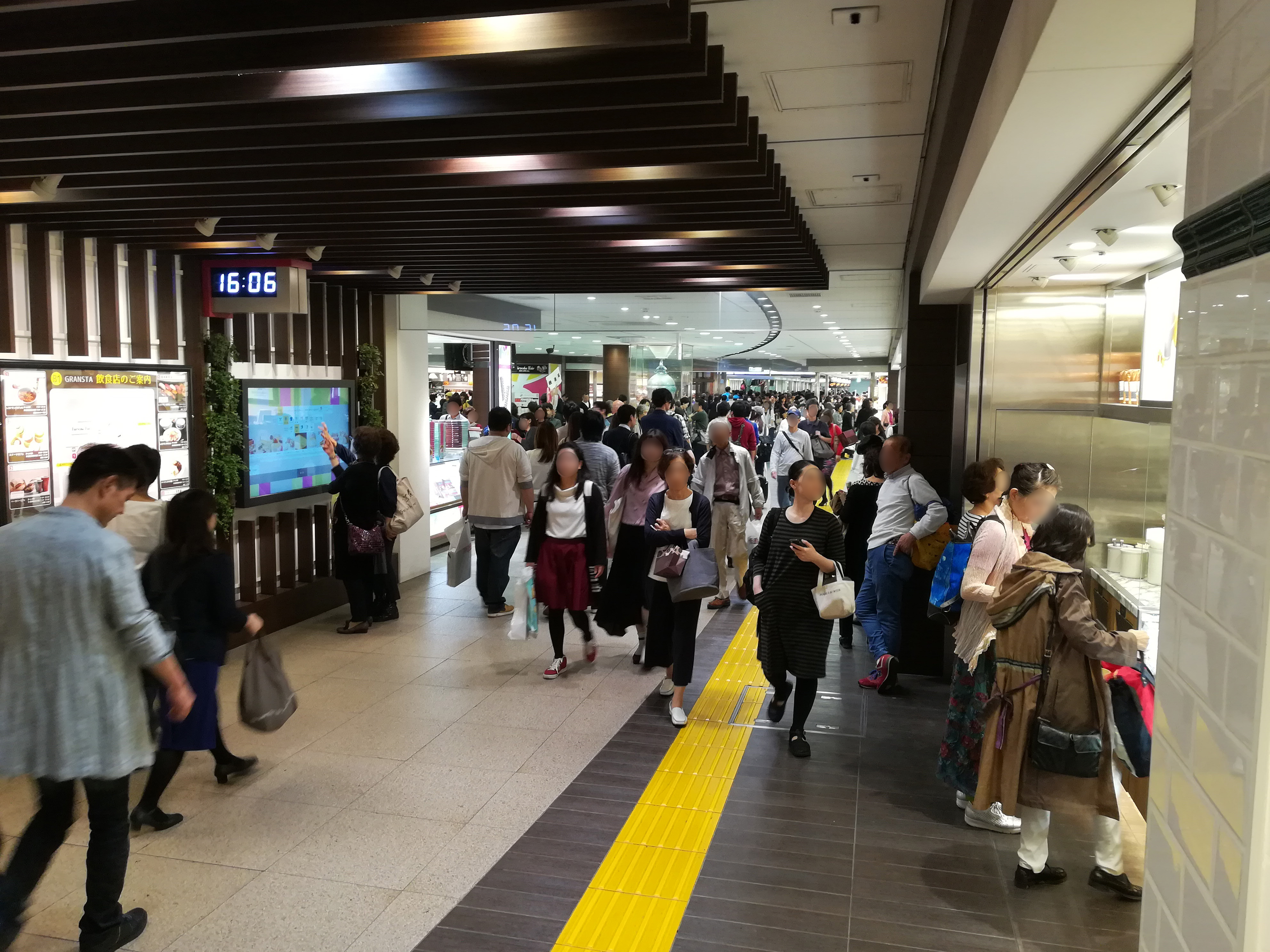 東京駅改札内商業施設「グランスタ」、交点で丸の内方面を展望